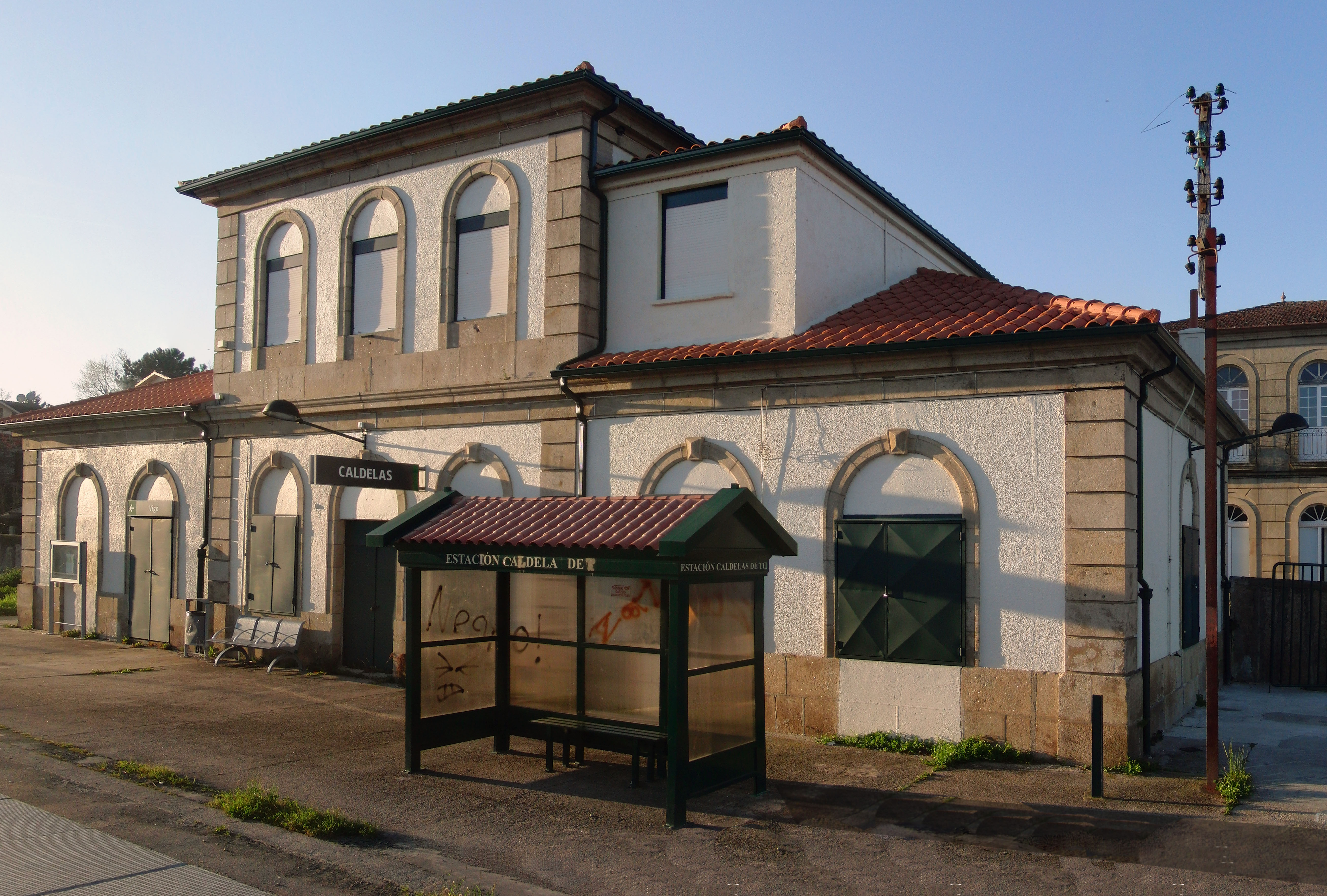 "caldelas de tui" tuy tui caldelas estacion tren retronauta "volviendo la vista atras"